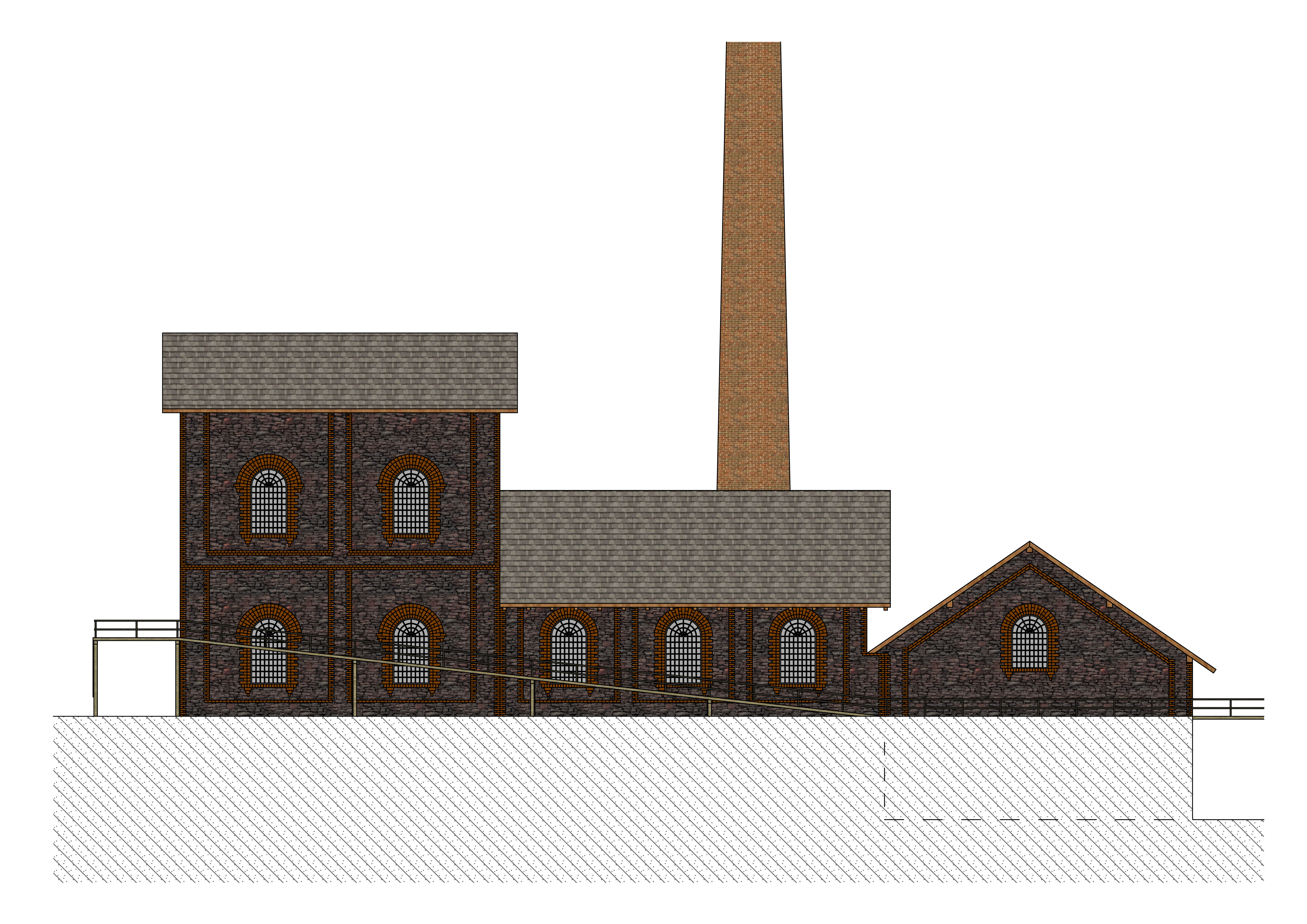 Seitenansicht des Schachtgebäudes Apfelbaum